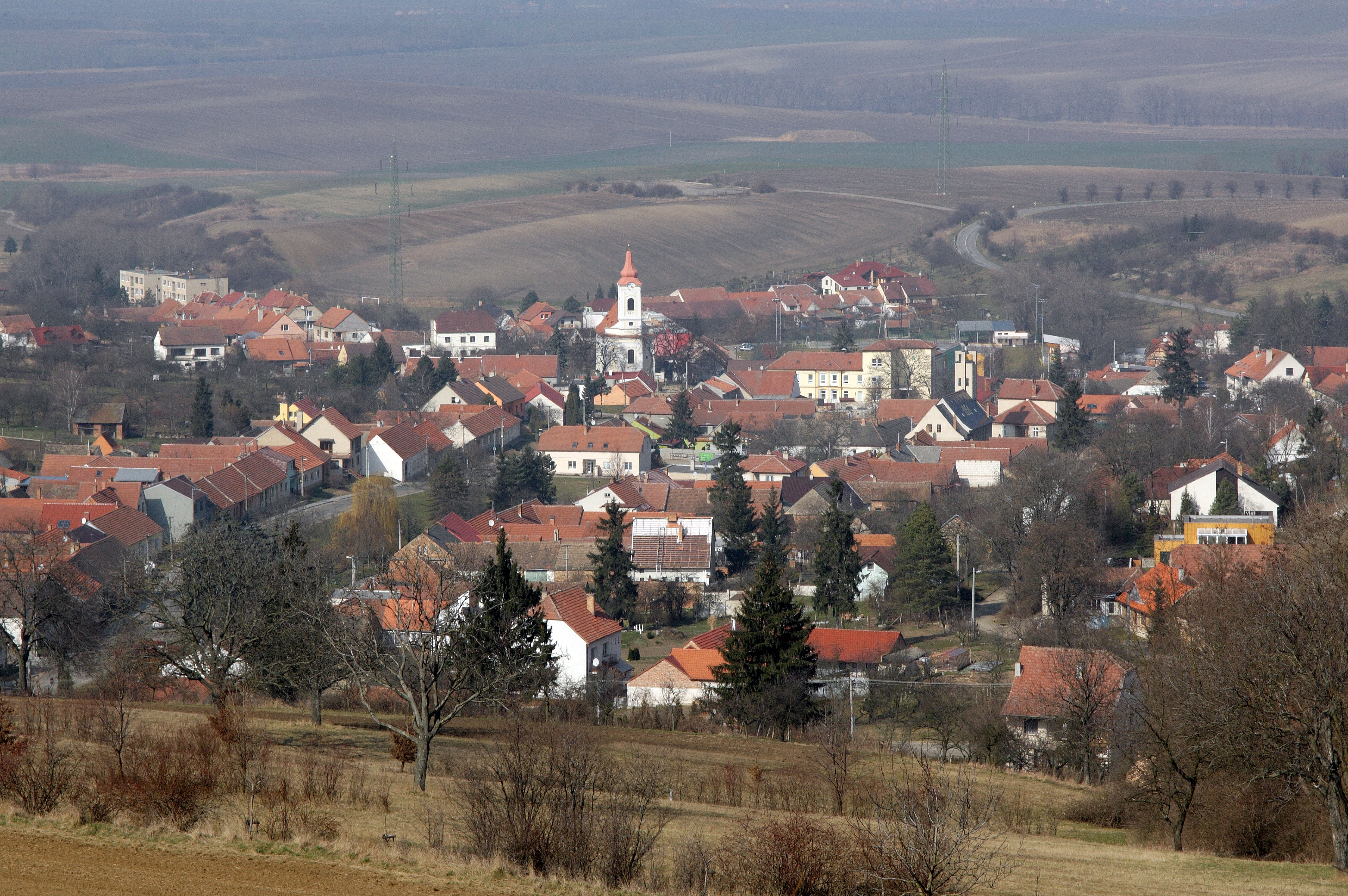 Nikolčice - pohled od jihu.